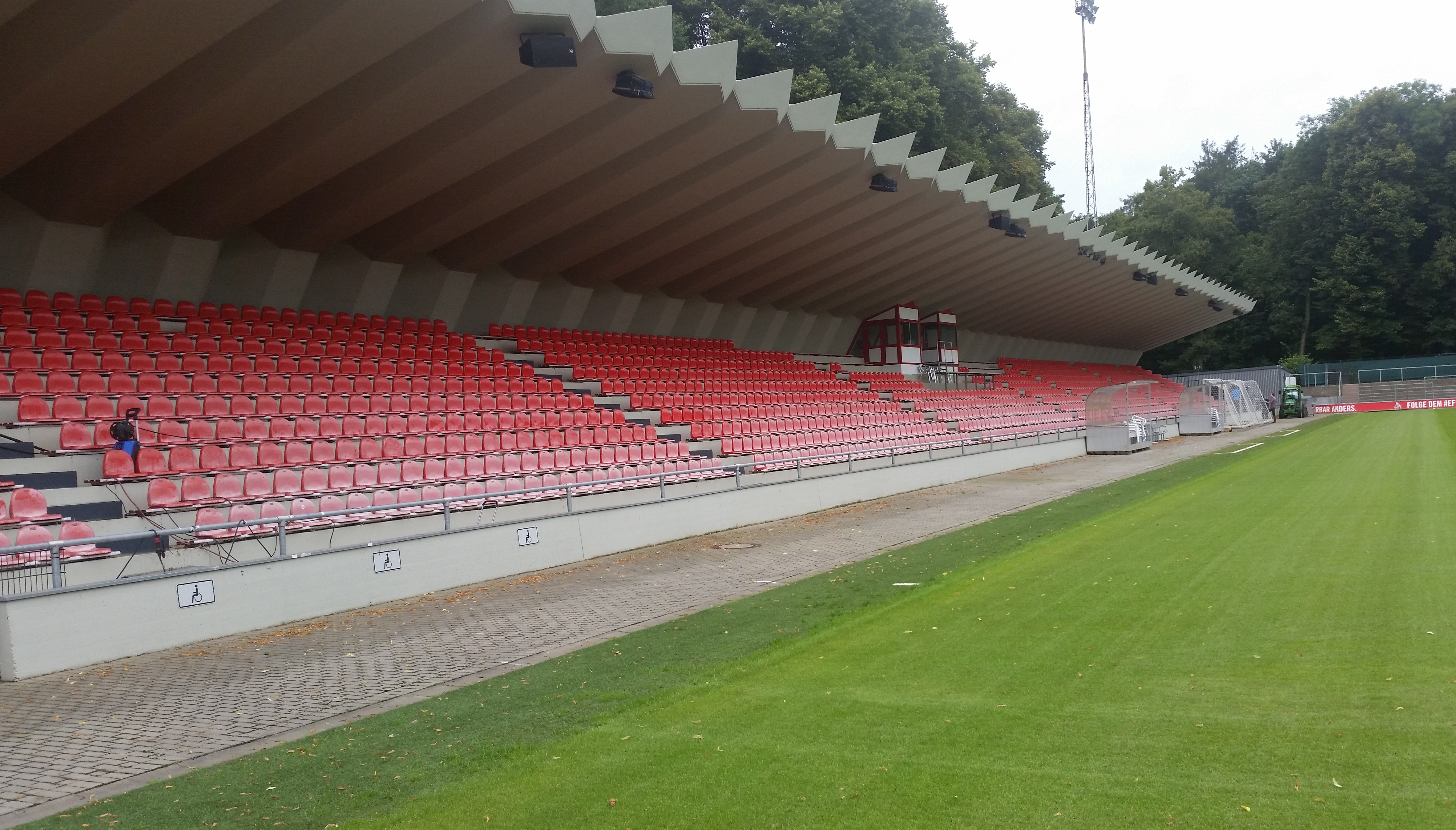 Haupttribüne des Franz Kremer Stadions, August 2016